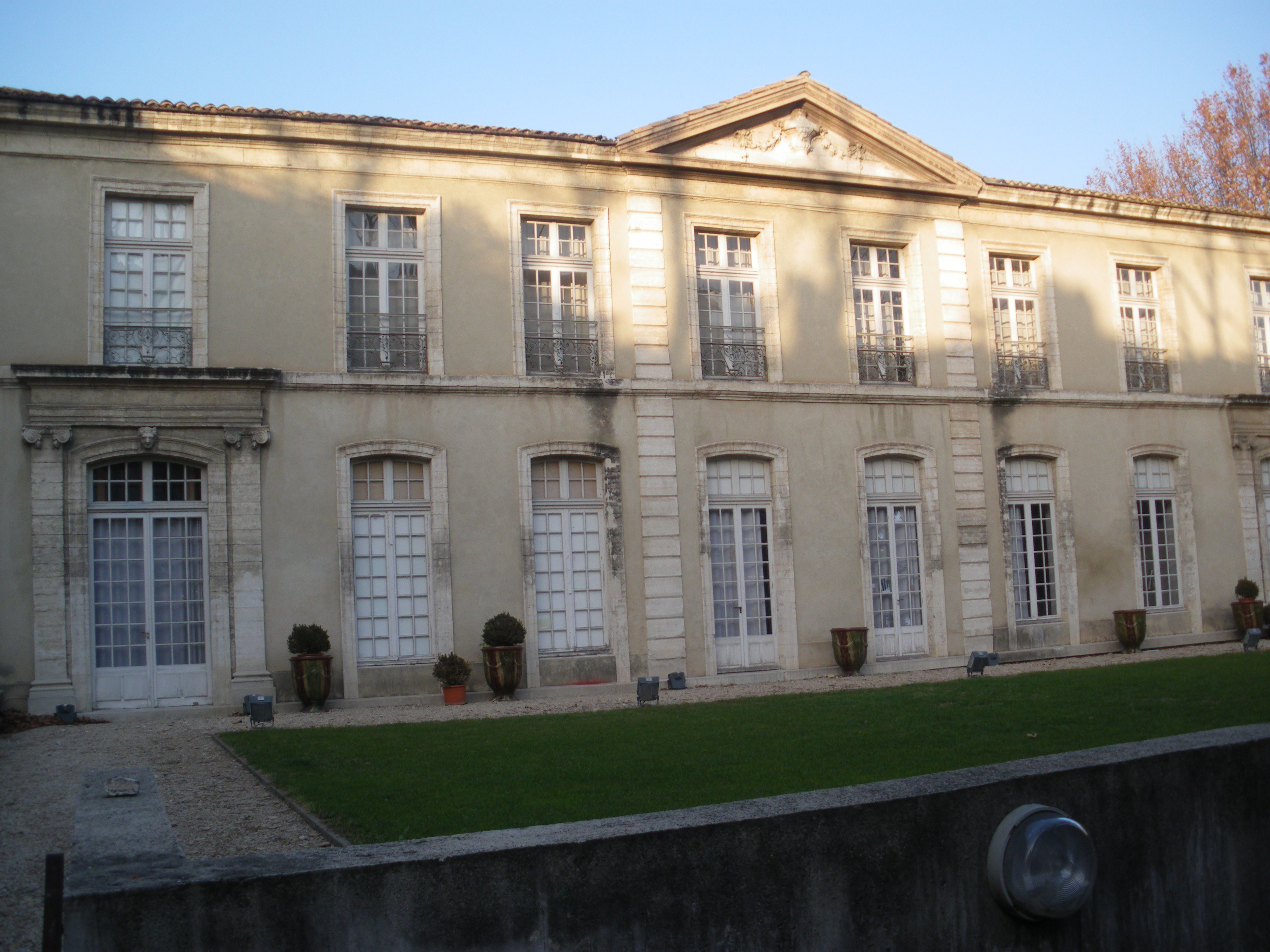 Hotel Caumont, Avignon